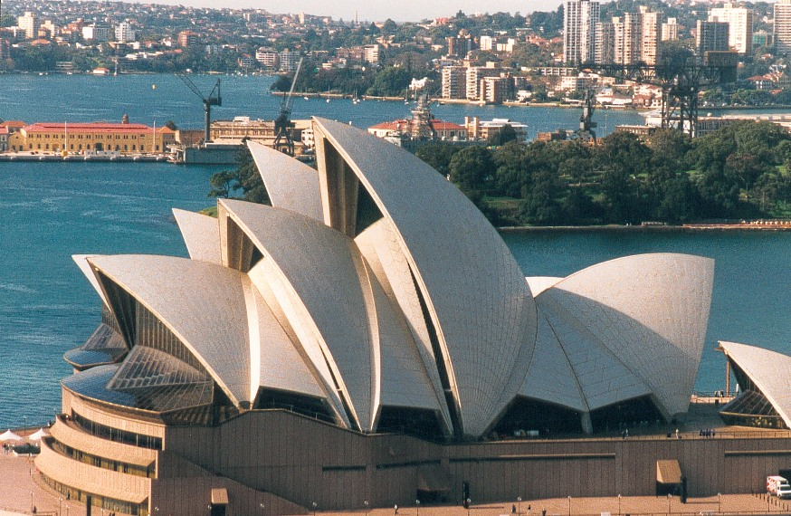 Copyright : Georgio, Date : juillet 1999 Opéra de Sydney, Australie